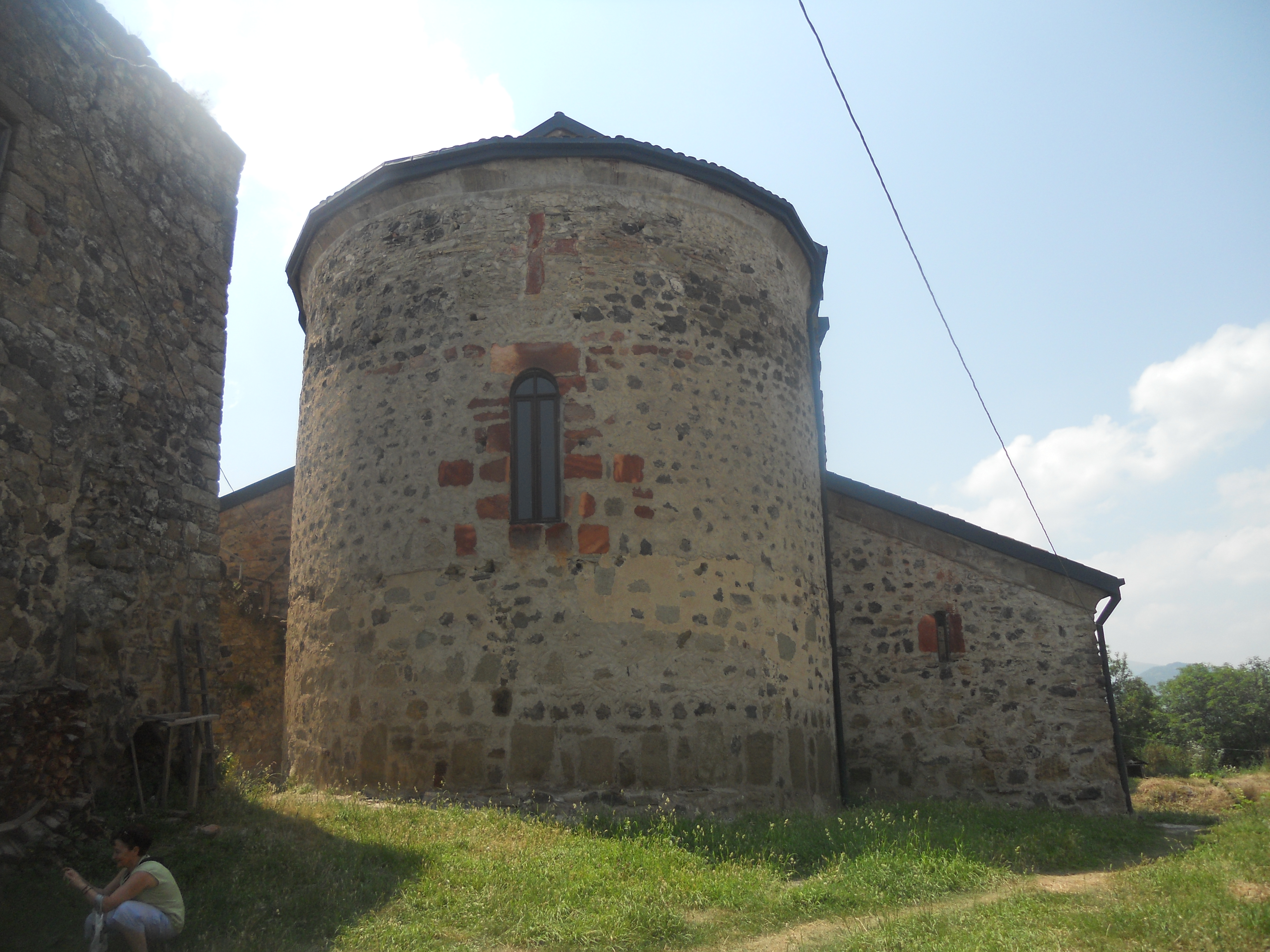 დმანისის ნაქალაქარიდმანისის სიონი, პატარა დმანისის წმინდა მარინეს ეკლესია, სამრეკლო, გალავანი, აბანო და სხვა ნაგებობანი.